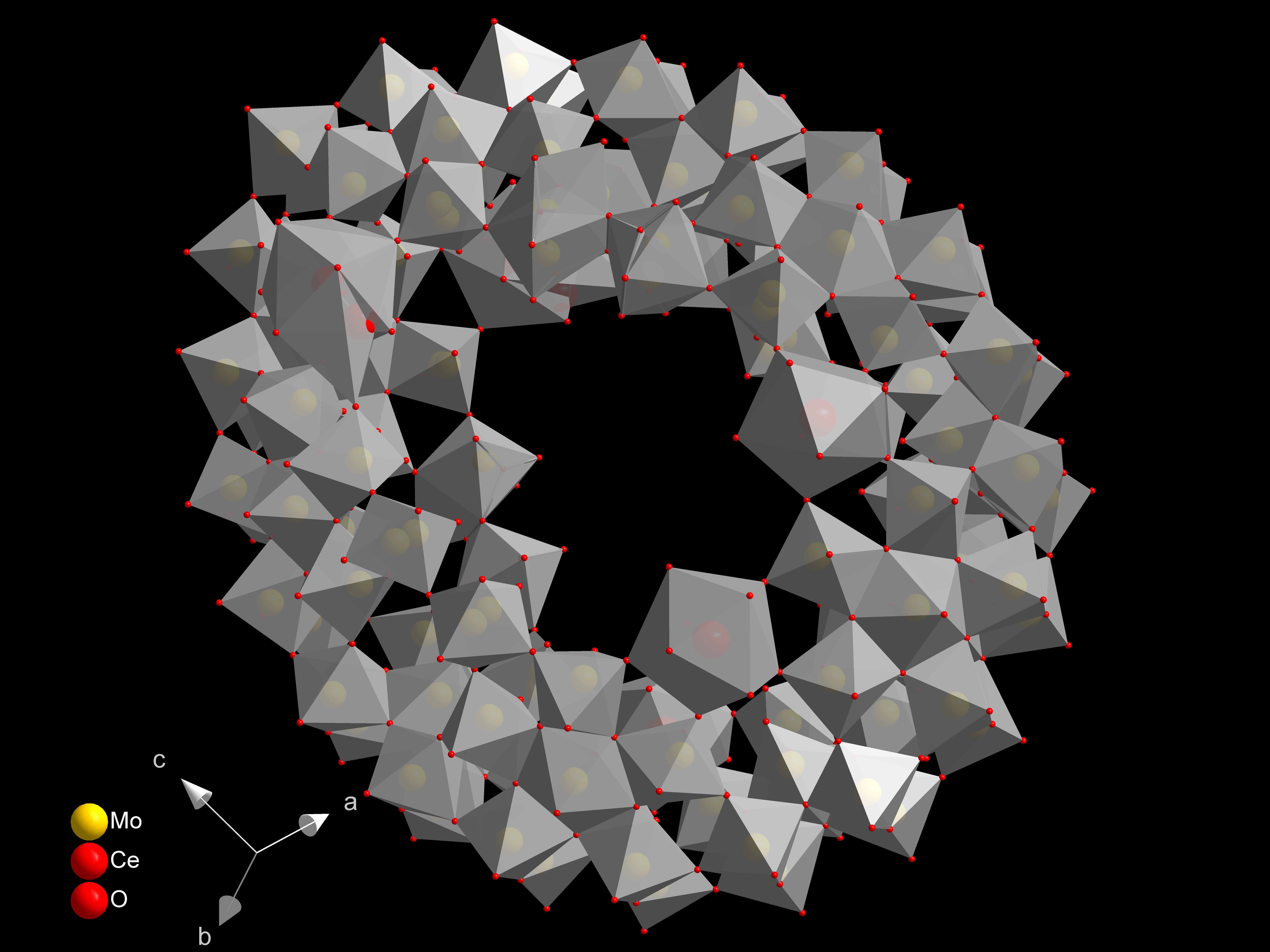 Die radförmige Molybdänblau-Spezies [Mo100Ce6].